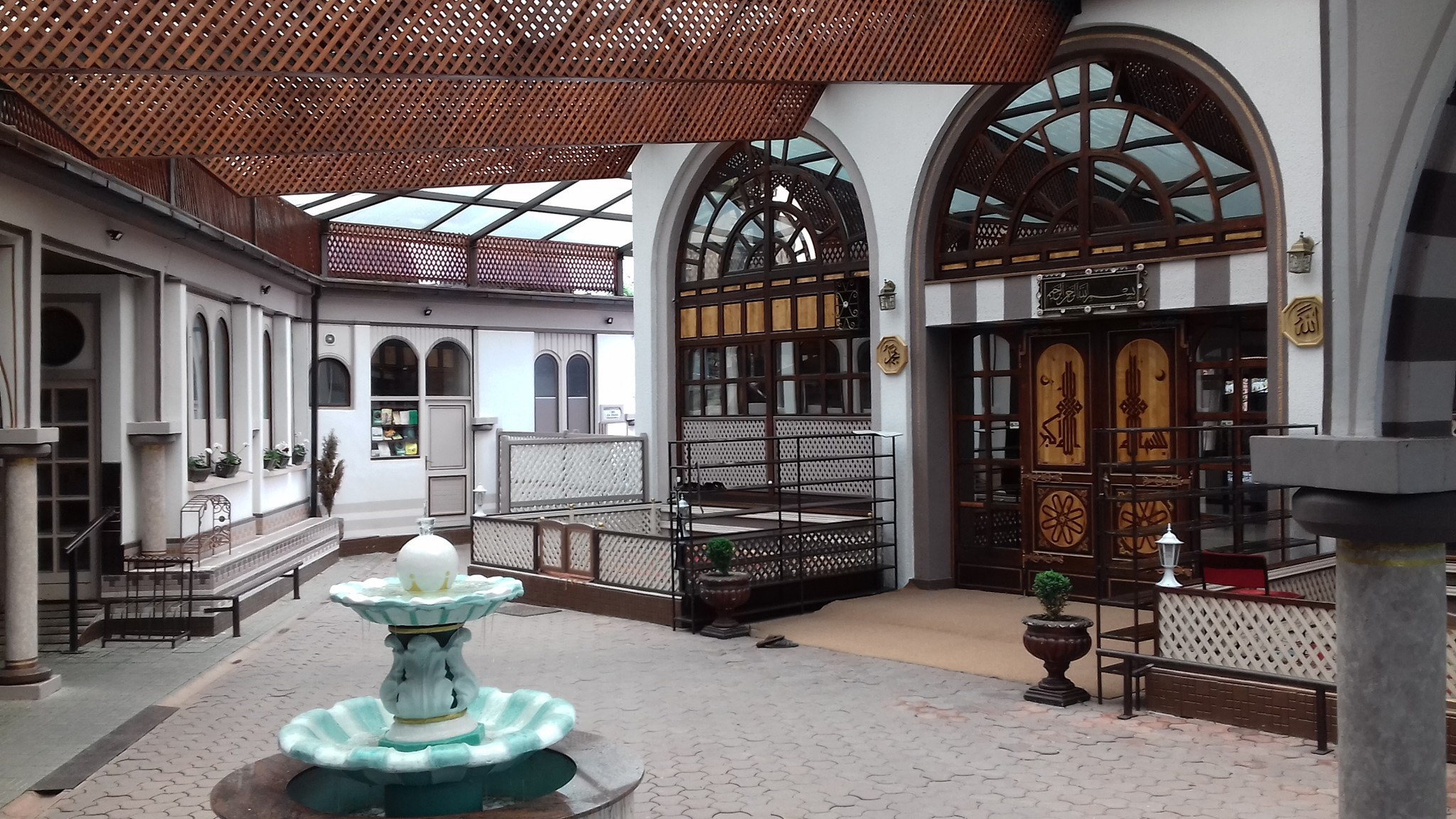 Кочевска џамија